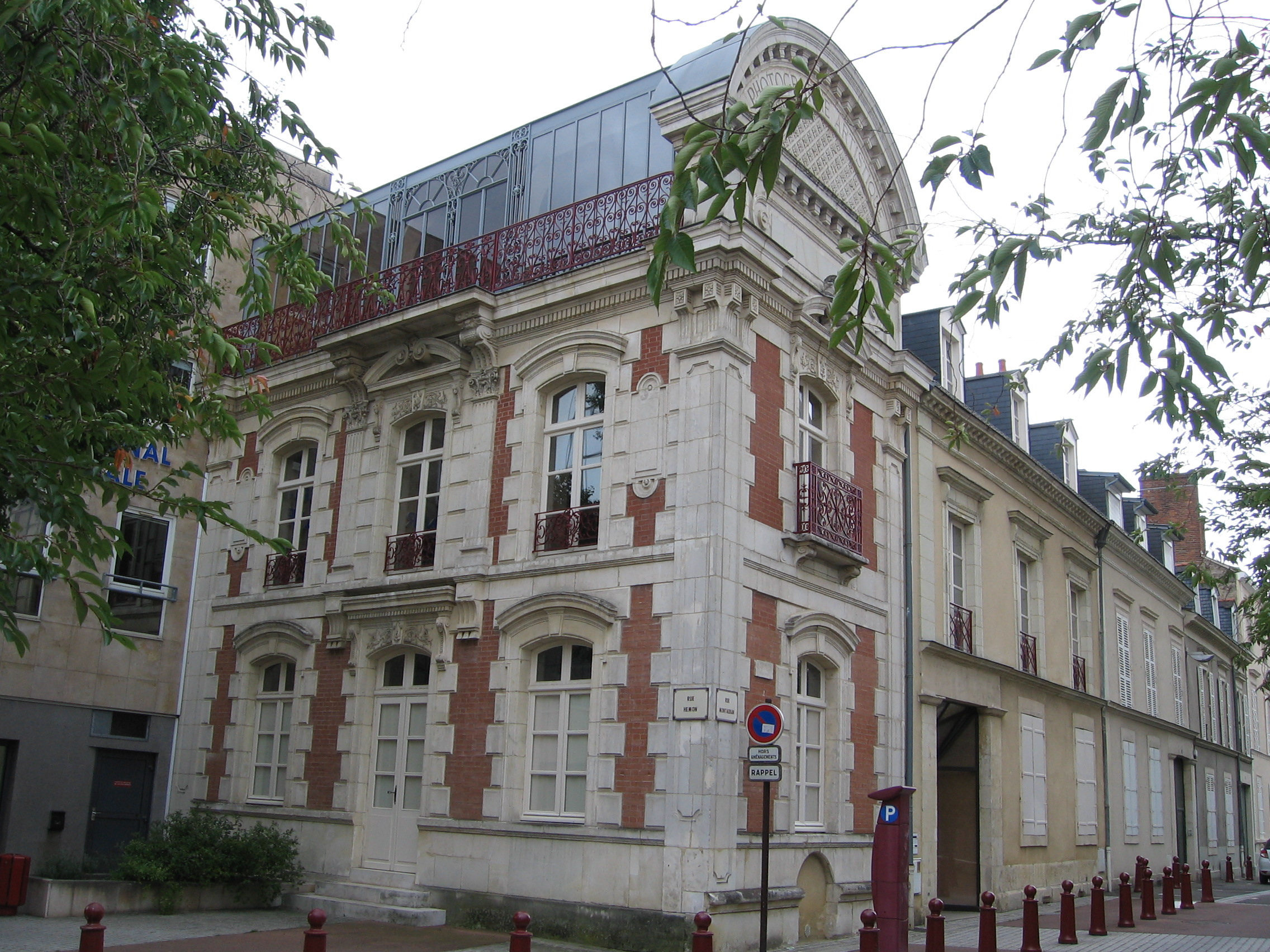 Maison construite en 1873 pour Gustave Cosson artiste-photographe à Le Mans, Sarthe, France